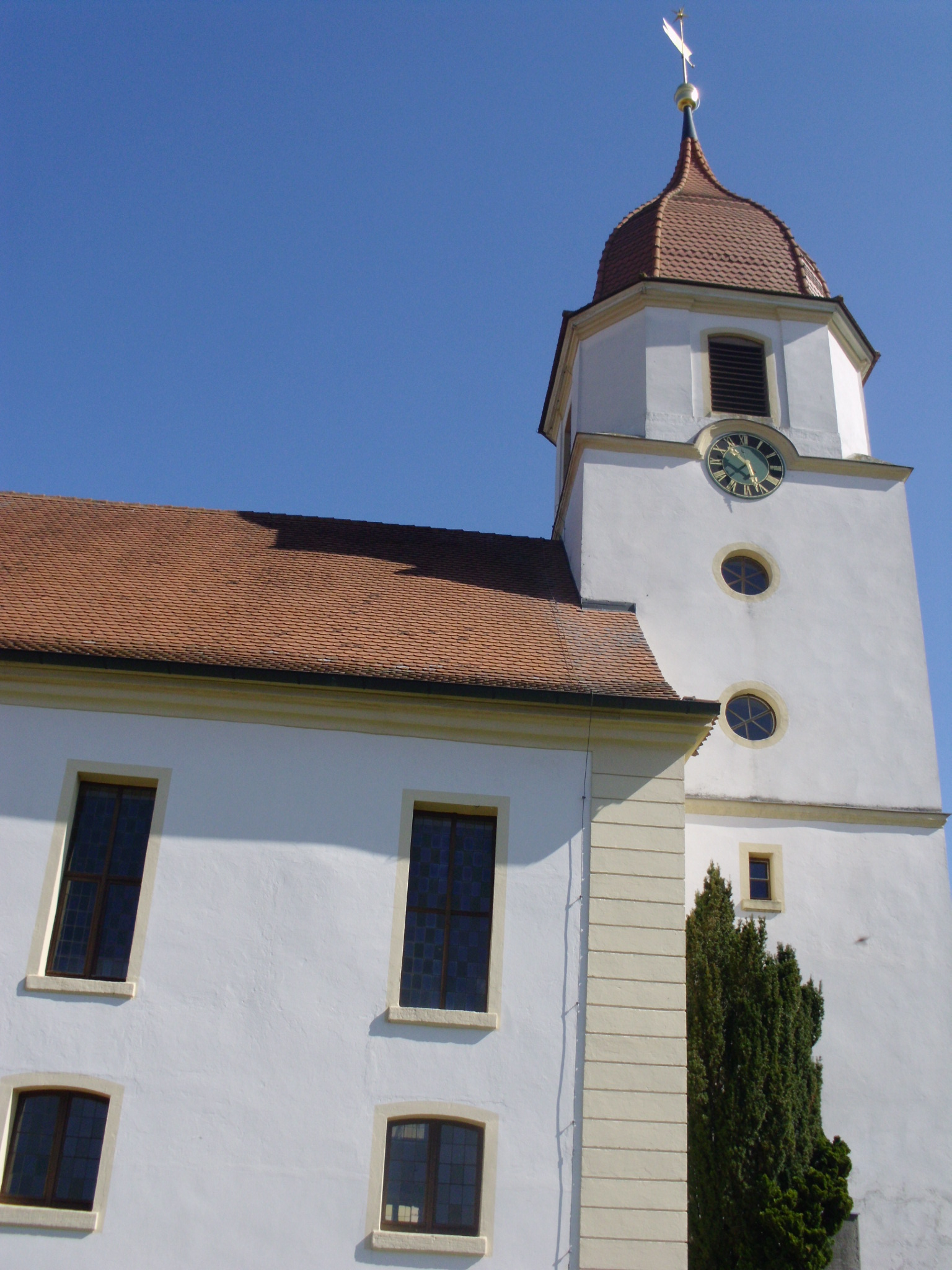 Altentrüdingen, Gemeindeteil von Wassertrüdingen im Landkreis Ansbach, Ev.-Luth. Nikolaus-und Theobald-Pfarrkirche